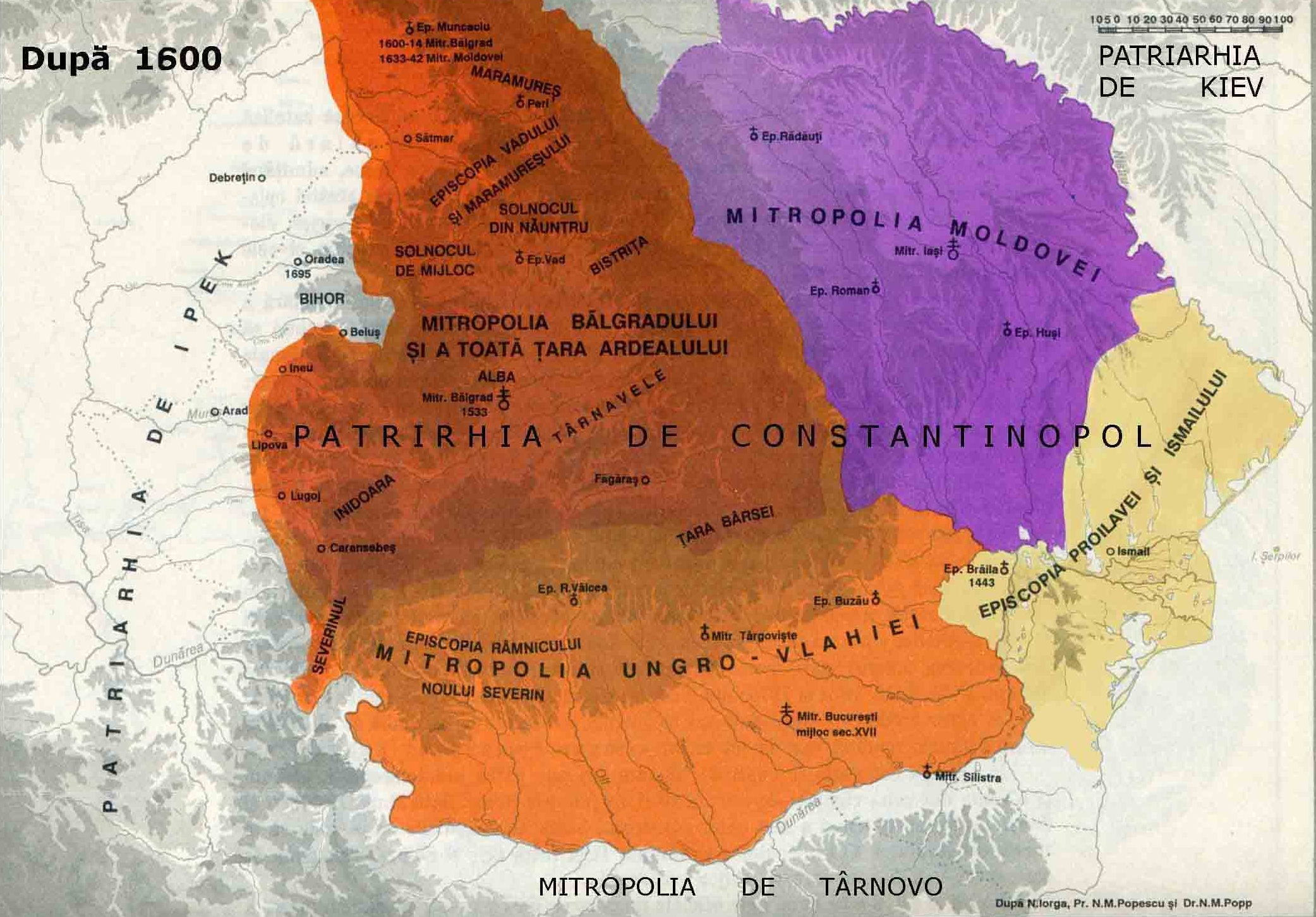 Mitropolii pe teritoriul României după anul 1600.